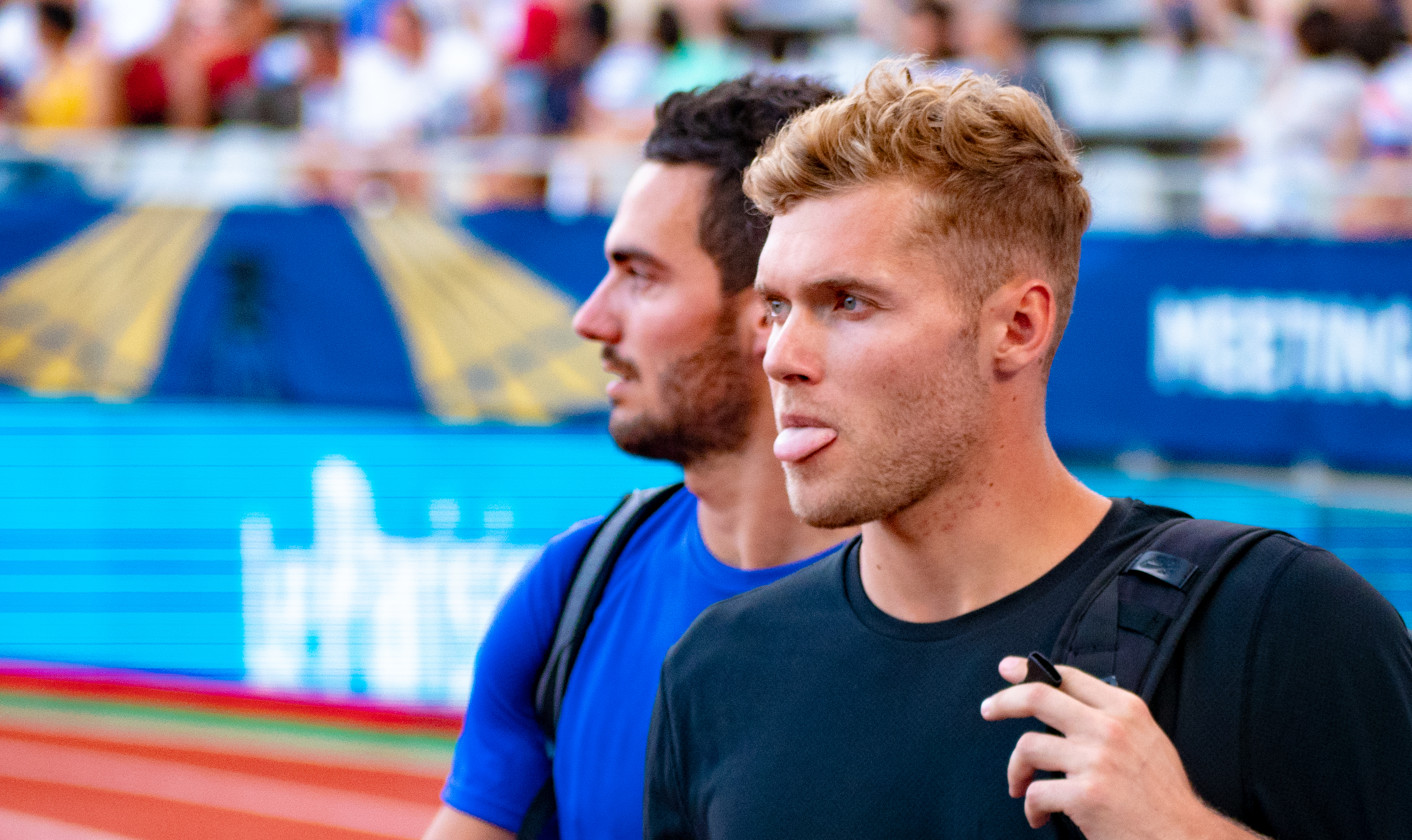 Kevin Mayer et Jeremy Lelievre